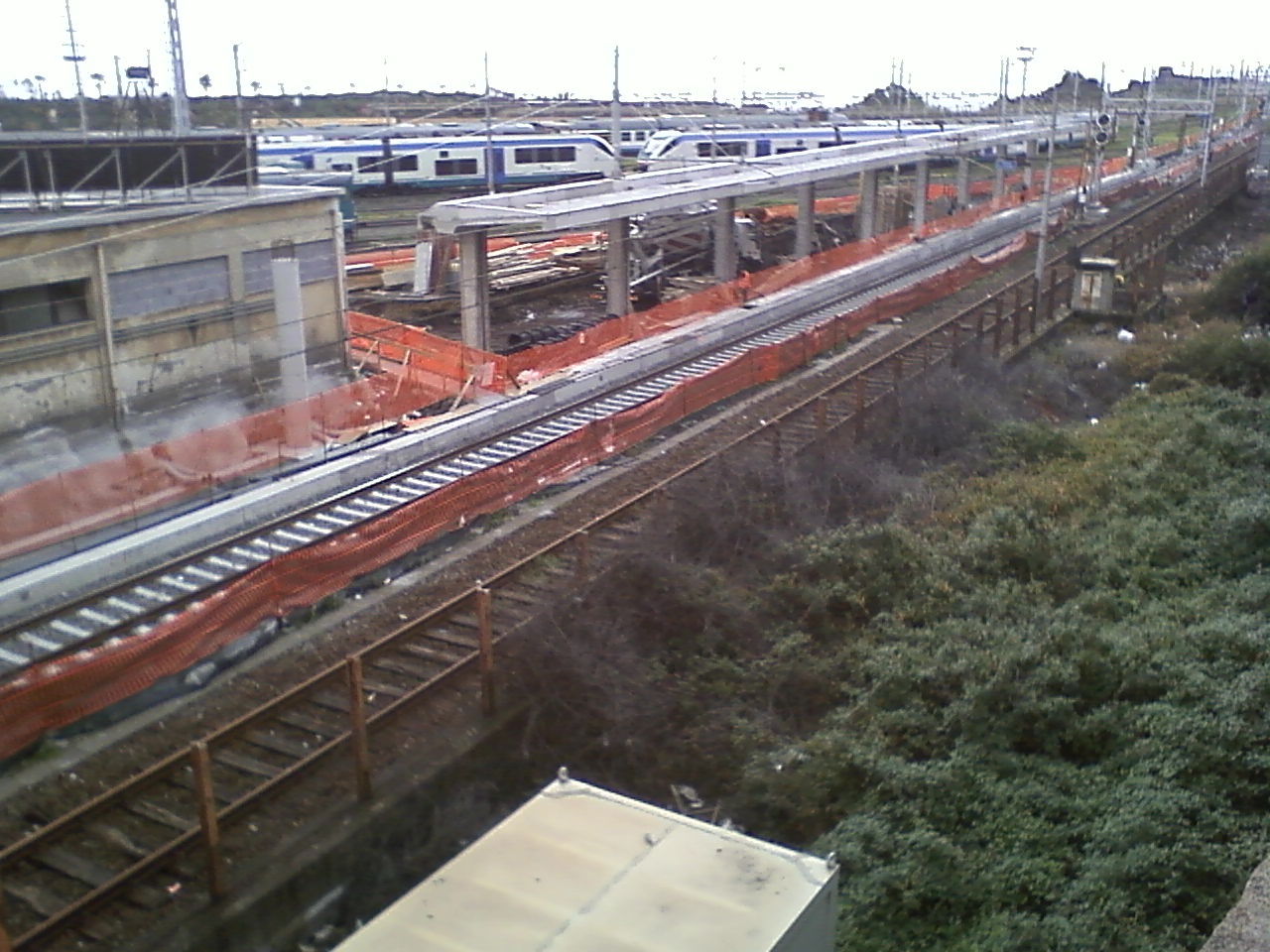 Lavori di costruzione passante ferroviario di Catania e nuova fermata Europa.